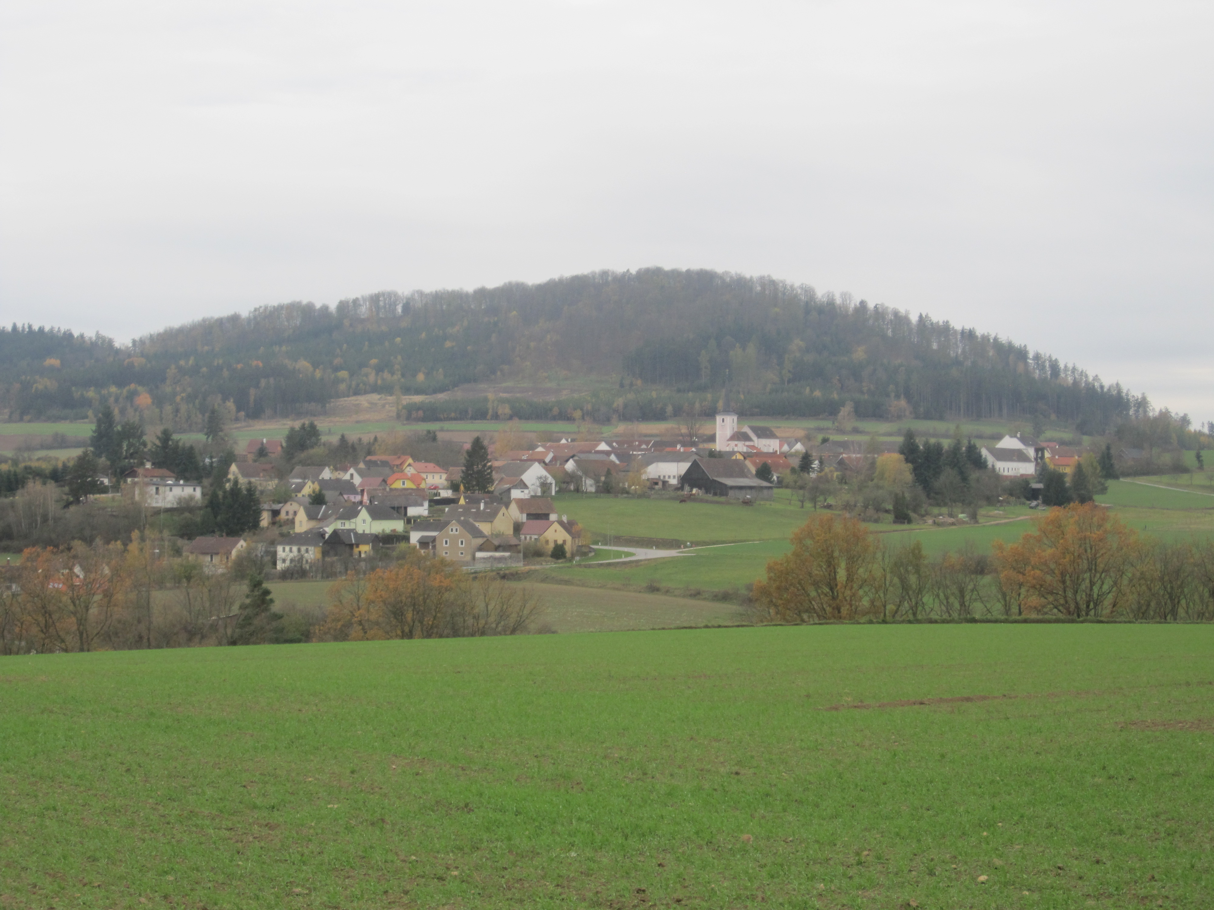 Speisendorf mit Häuslberg (610m) im Hintergrund.